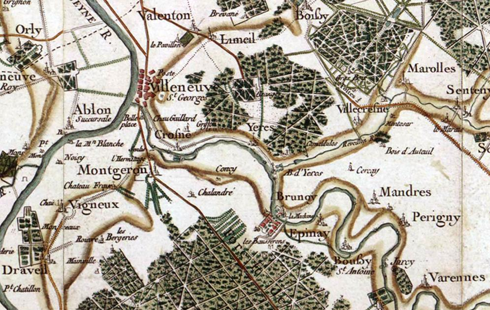 Carte de la région d'Yerres au XVIIe siècle par Cassini.